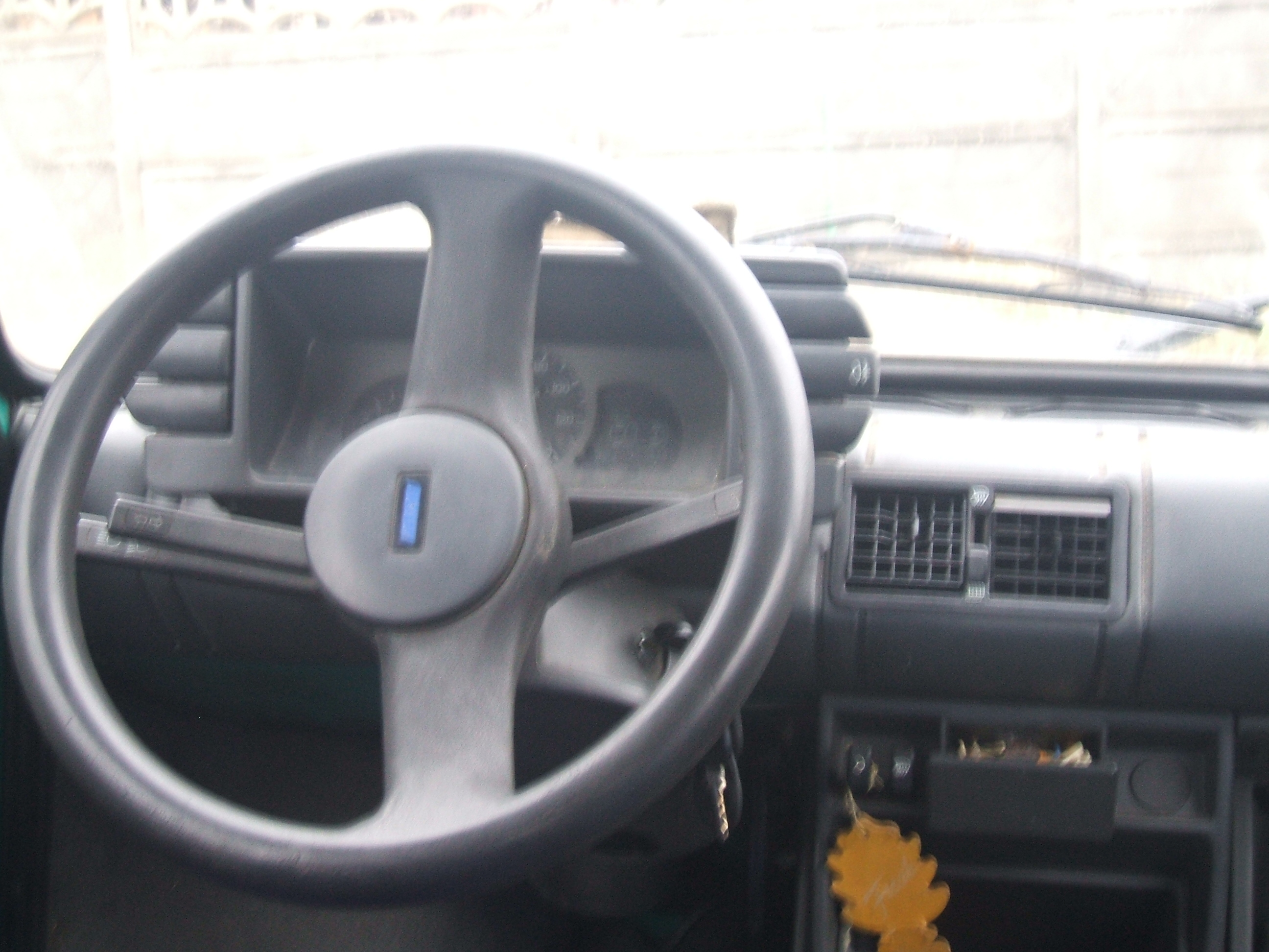 To jest Fiat 126p od środka (widok na kierownicę)